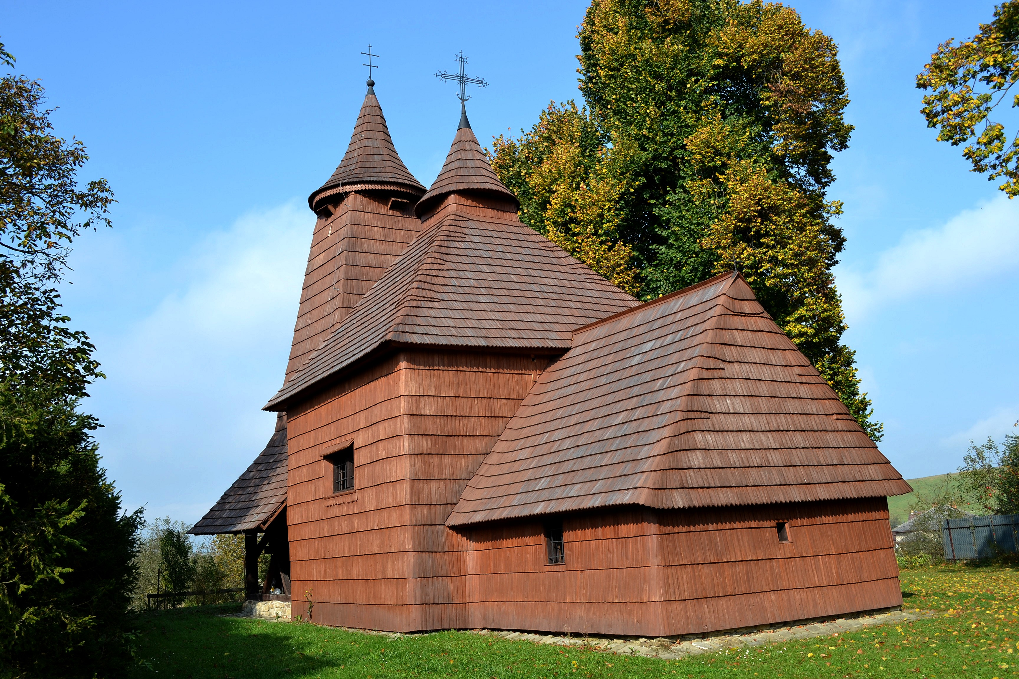 Gréckokatolícka Cerkva svätého Lukáša v Tročanoch (okr. Bardejov). Celkový pohľad na kostolík